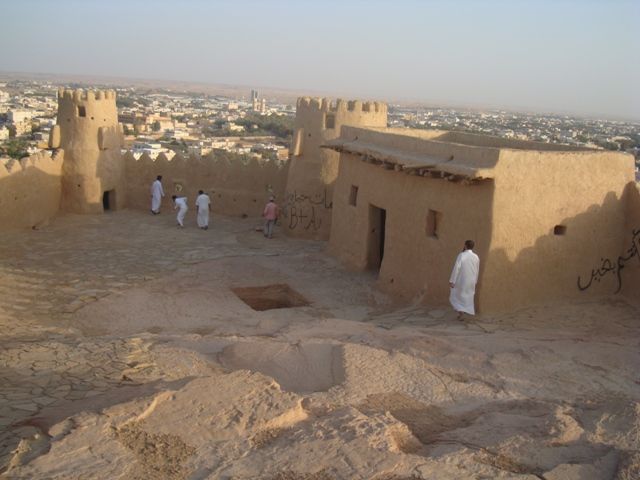 زعبل من الداخل